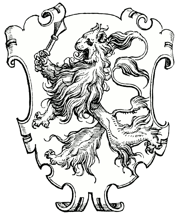 Hugo Gerhard Ströhl: "Heraldischer Atlas". Stuttgart 1899. Tafel 8, Der Löwe, Bild 5, Wappen des Paul Hector Mair. Als Schildfigur erscheint ein, einen Pusikan (Streitkolben) schwingender Löwe.